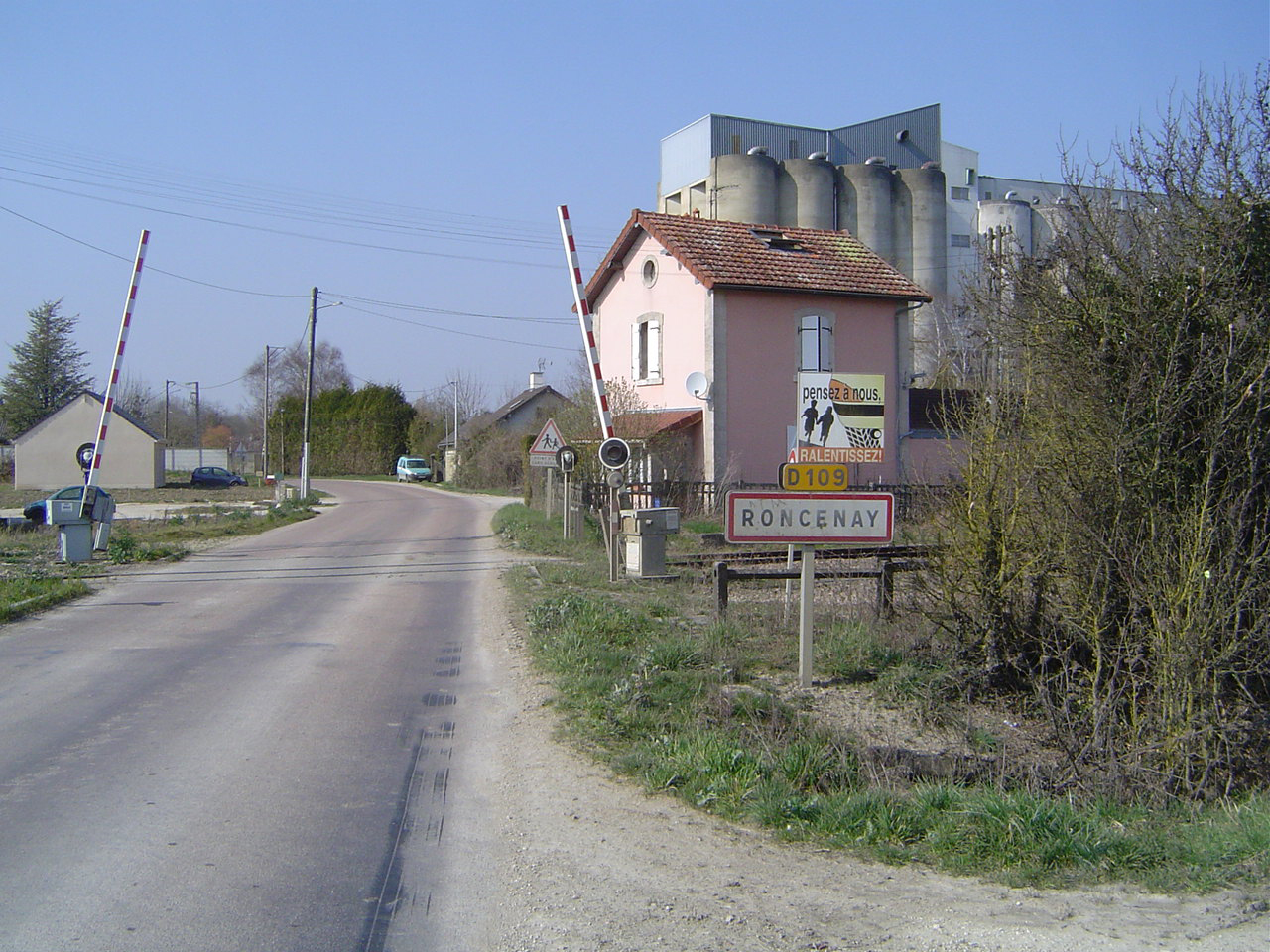 Roncenay - Les silos